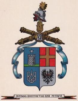 Stemma del 9° Gruppo Artiglieria Pesante "Rovigo" (vecchio)